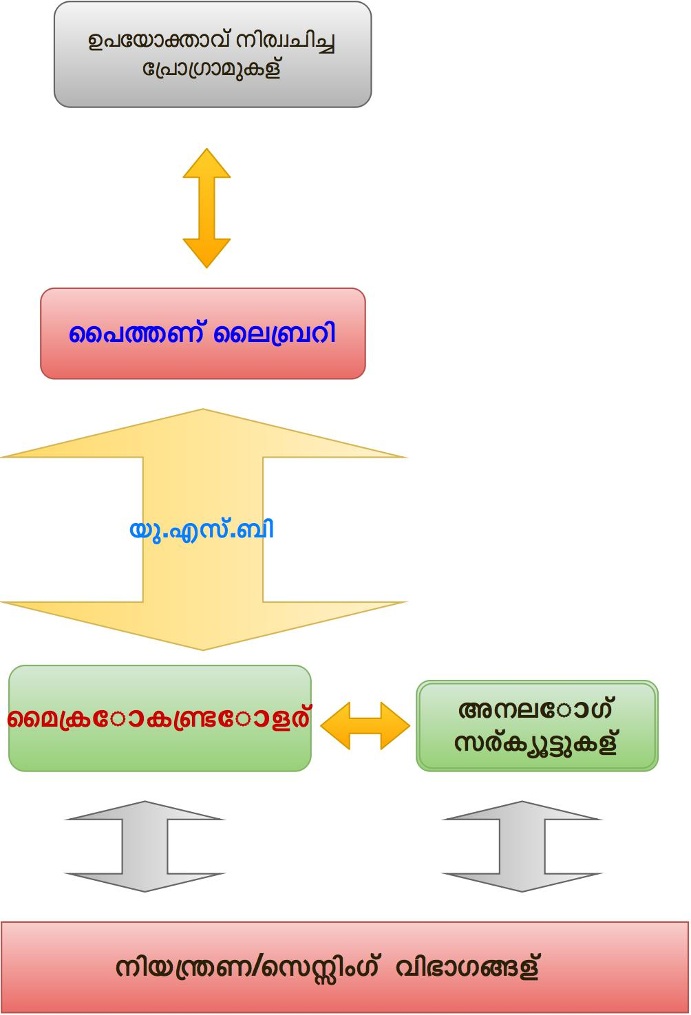 എക്സ്പ് ഐയ്സ് ബ്ലോക്ക് ഡയഗ്രം